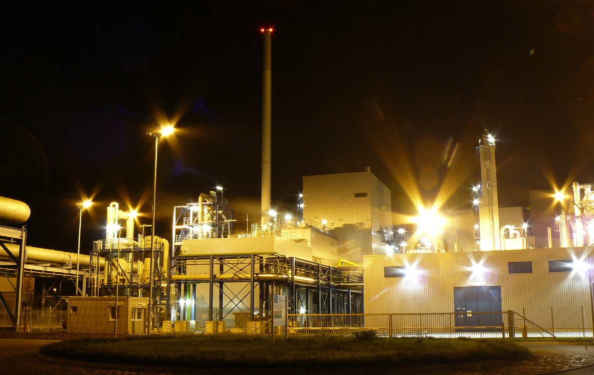 CO2-emissionsarmes Kraftwerk Schwarze Pumpe bei Nacht/ Spremberg/ Brandenburg/ Deutschland